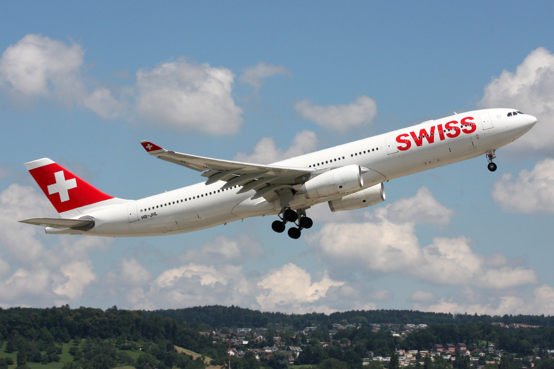 Zürich (- Kloten) (ZRH / LSZH) Switzerland 7.2012